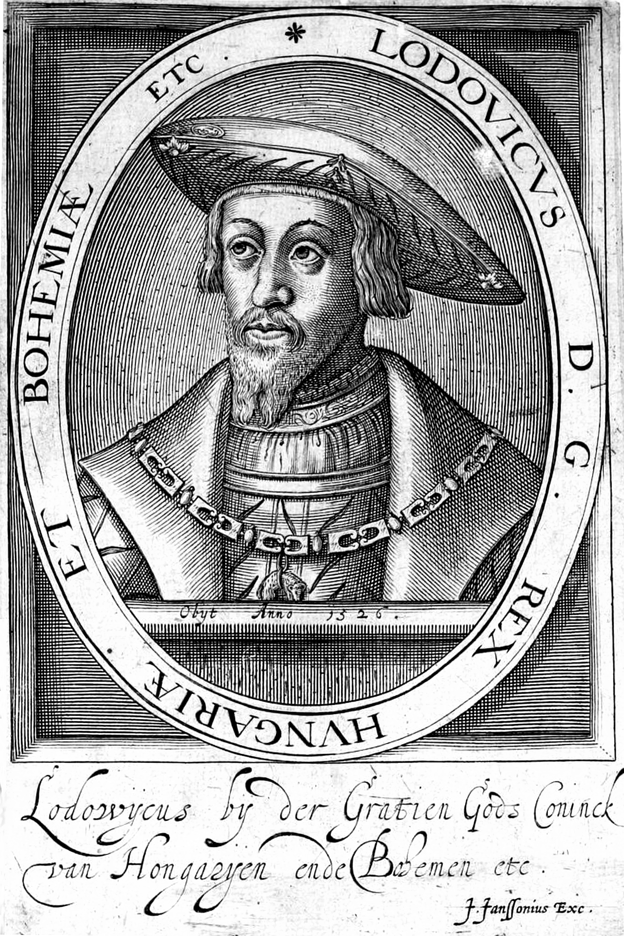 Grafik aus dem Klebeband Nr. 1 der Fürstlich Waldeckschen Hofbibliothek Arolsen Motiv: König Ludwig von Bäöhmen und Ungarn